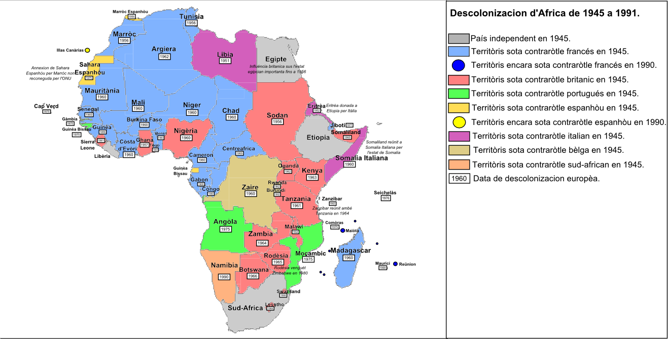 Descolonizacion d'Africa de 1945 a 1991.